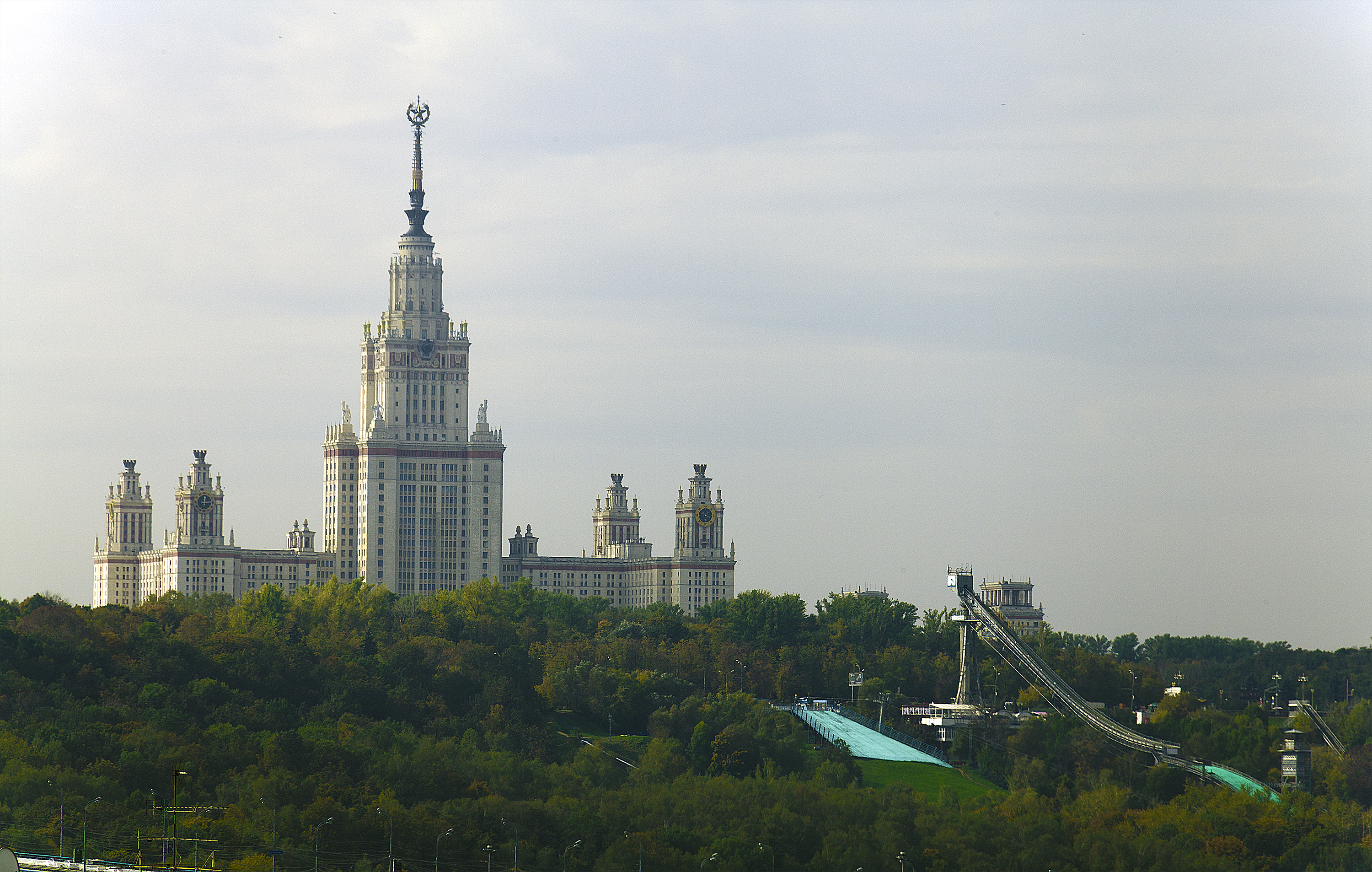 МГУ. Трамплин